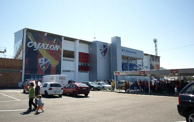 Estadio de El Alcoraz